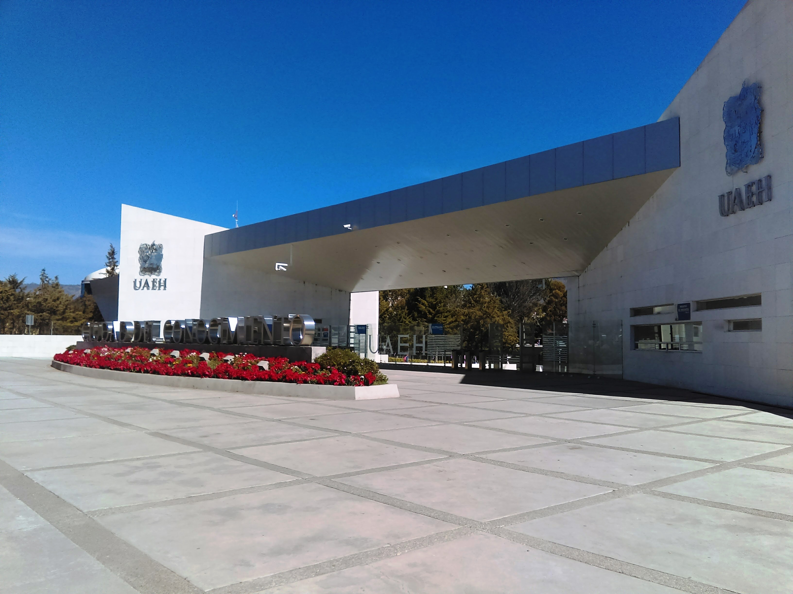 Entrada a la Ciudad del Conocimiento, UAEH.